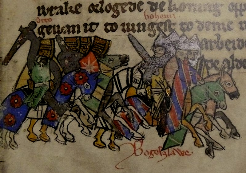 Ota I. a Češi s Boleslavem